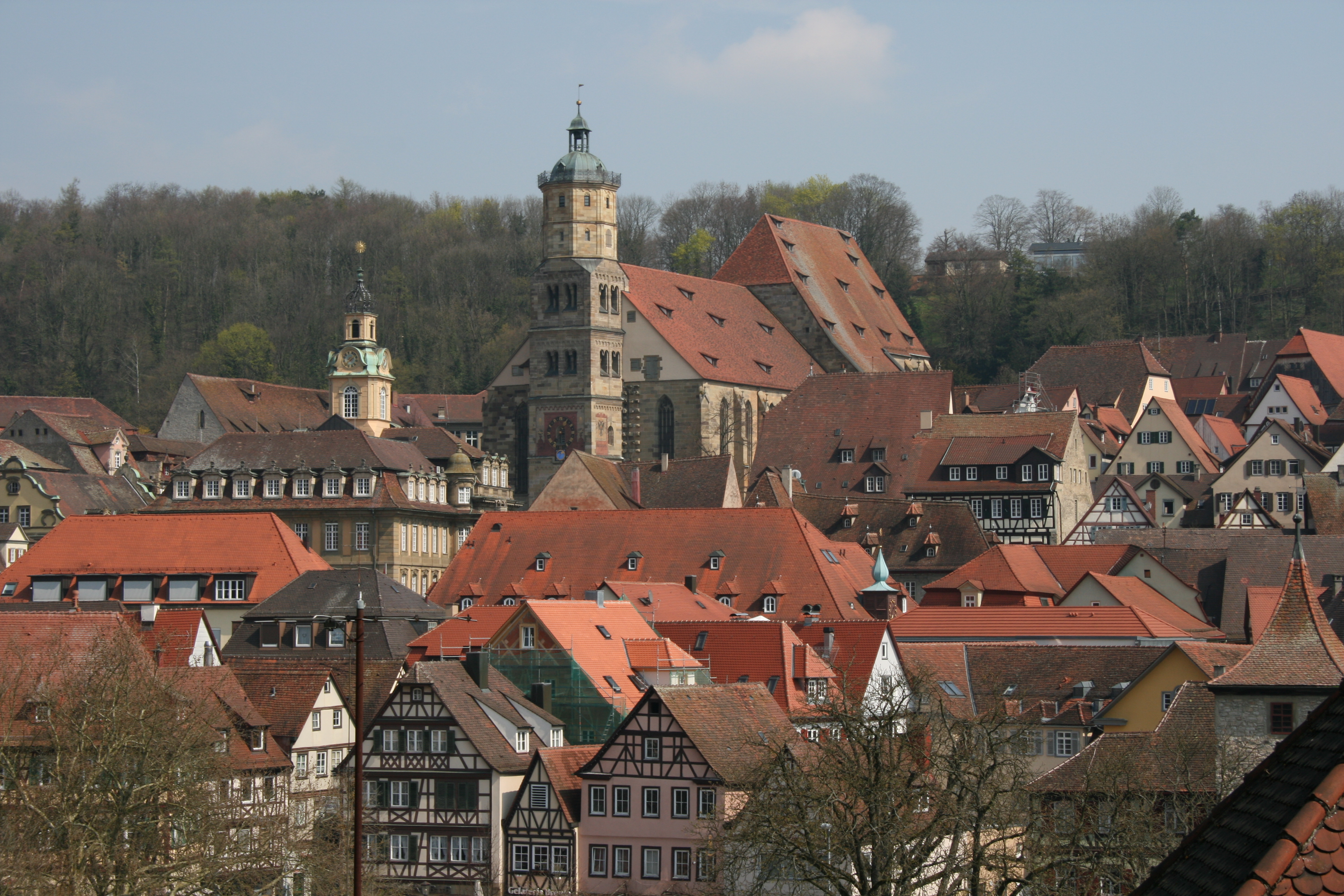 Blick auf die Altstadt von Schwäbisch Hall mit der Kirche St. Michael